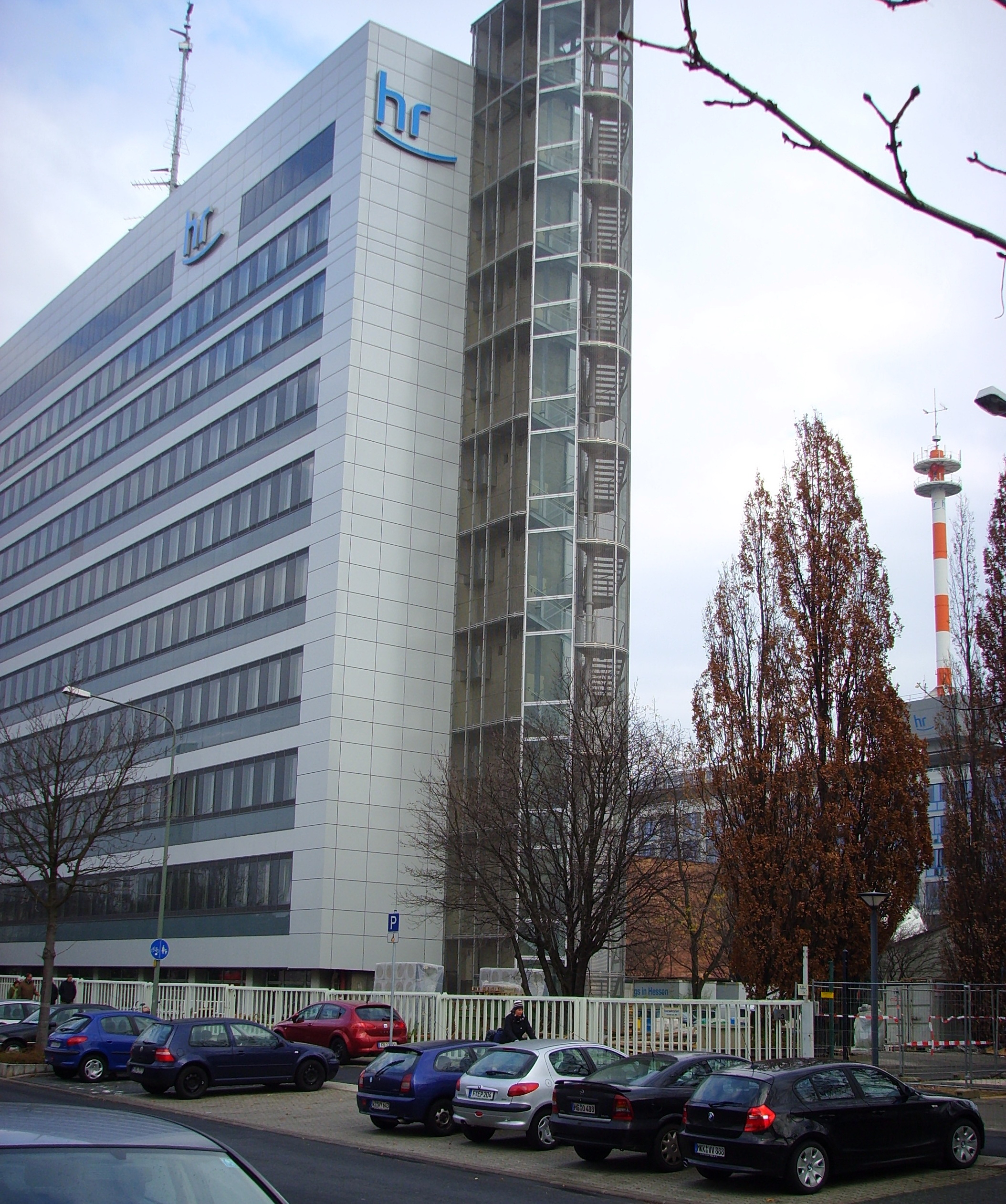 Hochhaus der zentralen ARD-Einrichtungen (Sternpunkt HF und FS, Deutsches Rundfunkarchiv) auf dem Gelände des Hessischen Rundfunks in Frankfurt am Main, Bertramstraße